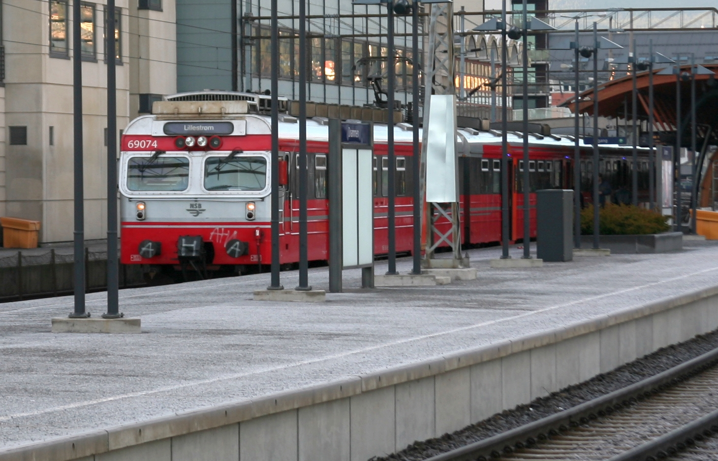 69 074 in Drammen